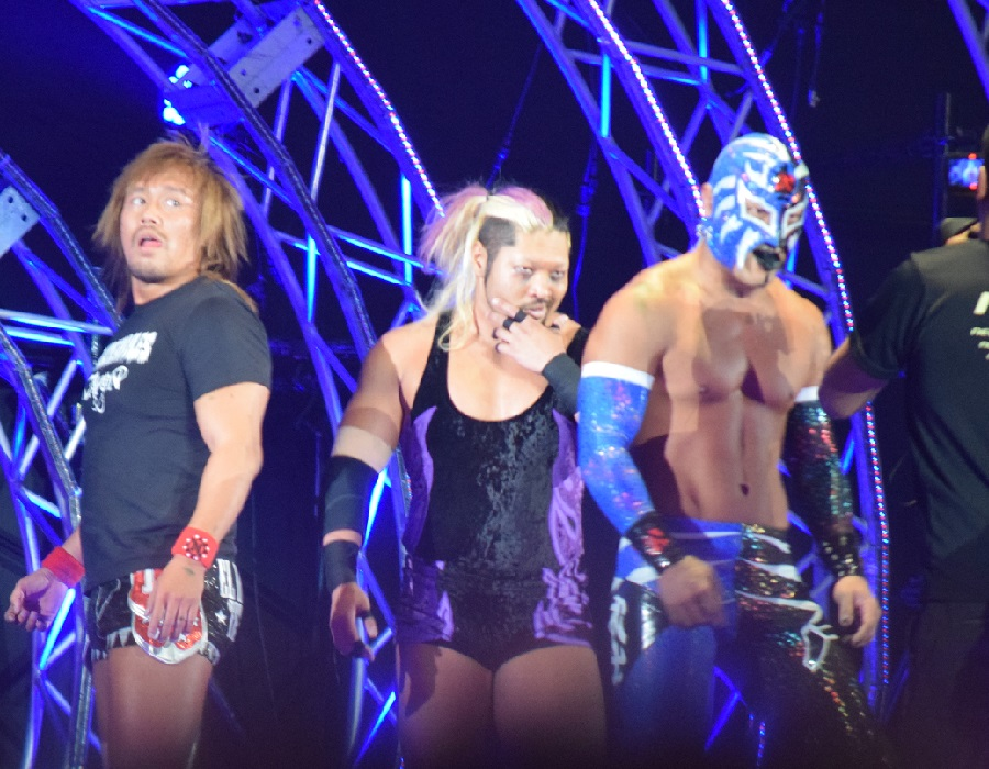 2016年2月11日 大阪府立体育会館 「THE NEW BEGINNING in OSAKA」 ロス・インゴベルナブレス・デ・ハポンの内藤哲也（左）とEVIL（中）とBUSHI（右）